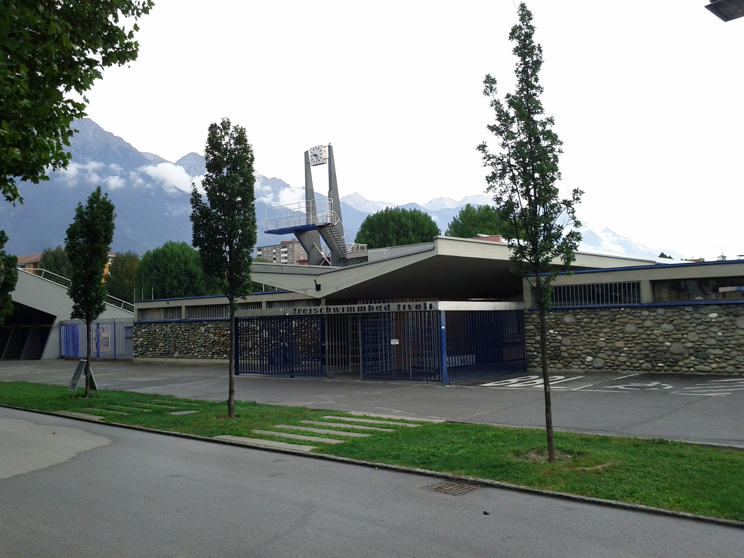 Tivoli-Freischwimmbad